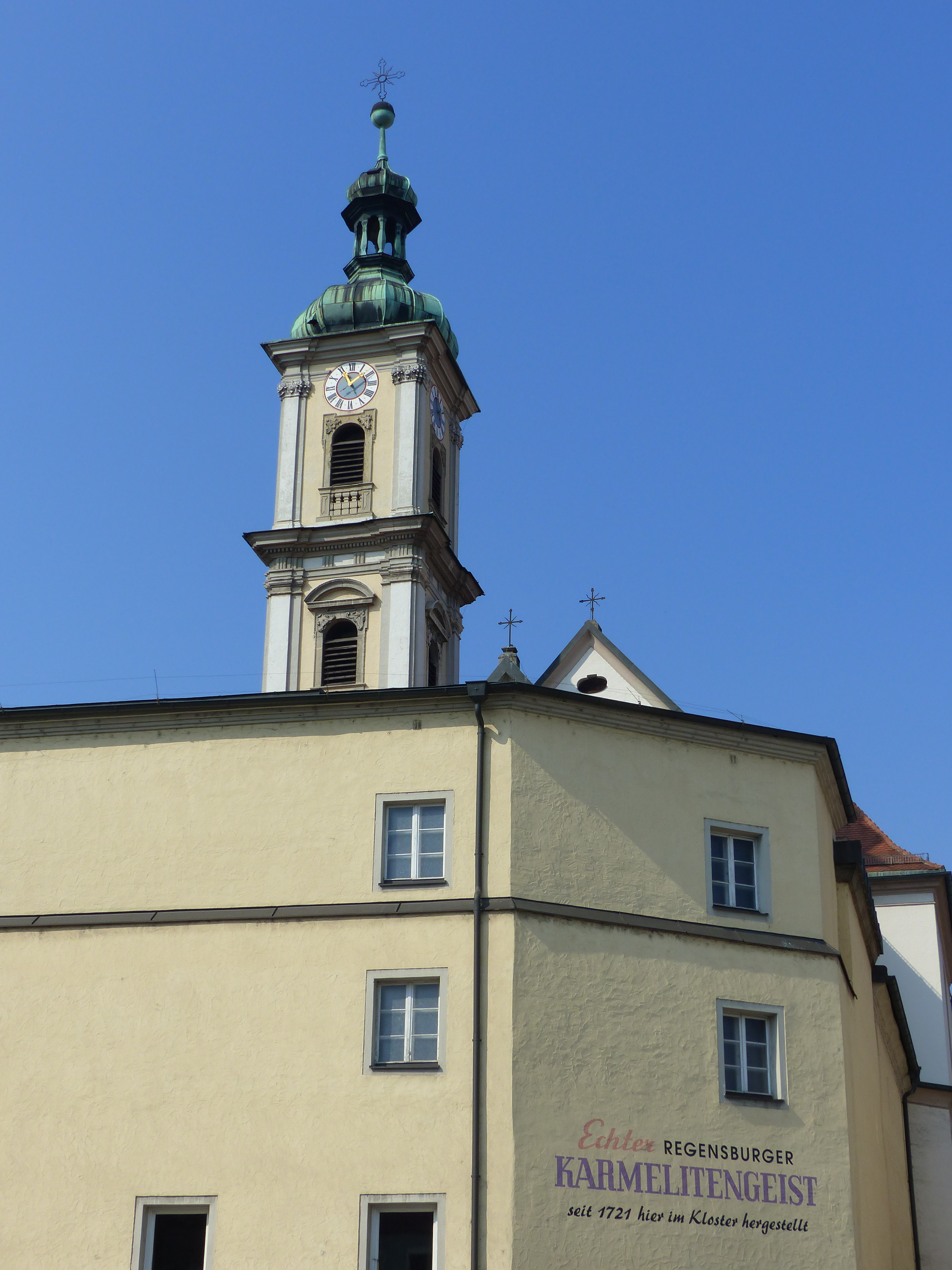 Karmelitenkloster in RegensburgThis is a photograph of an architectural monument.